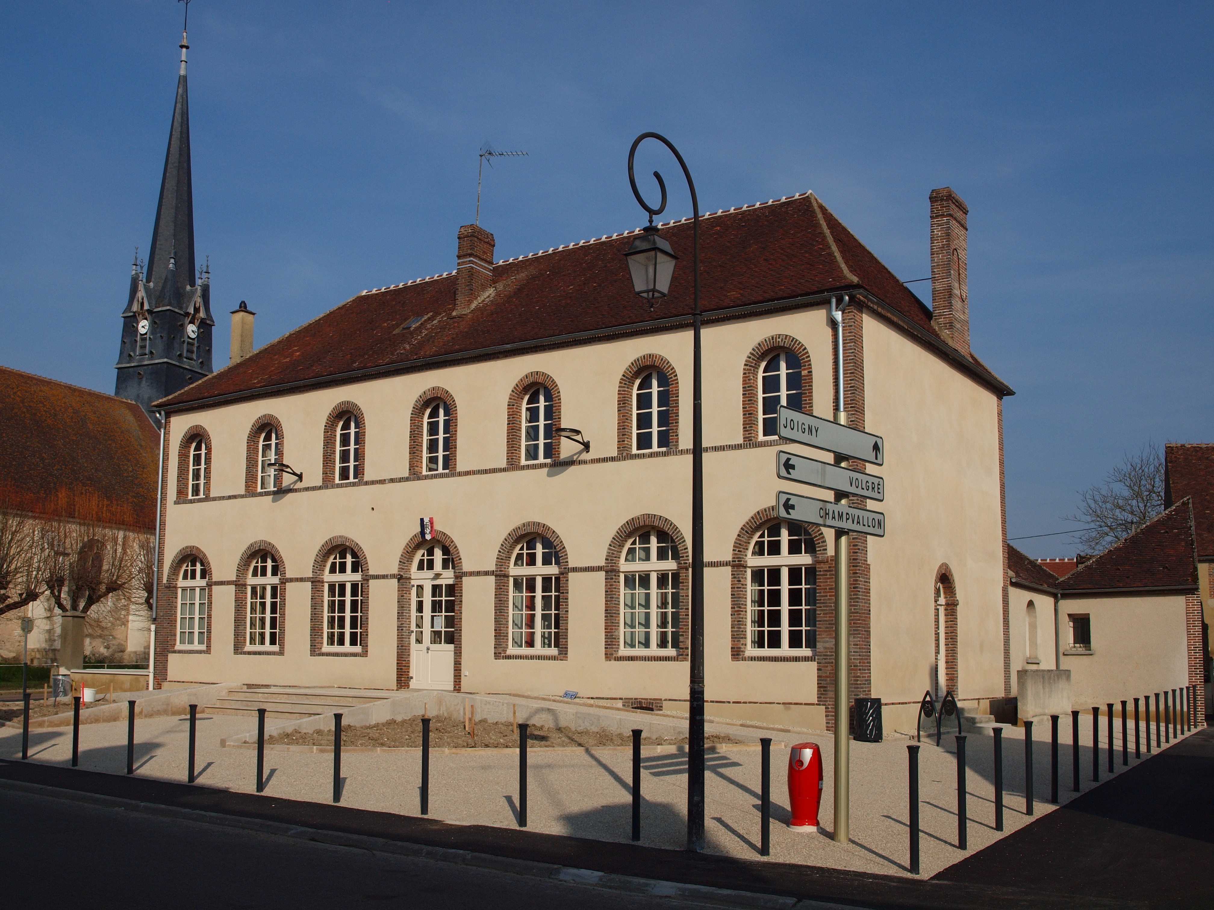 Mairie de Senan (Yonne, France) ; après la rénovation de fin 2018-début 2019.